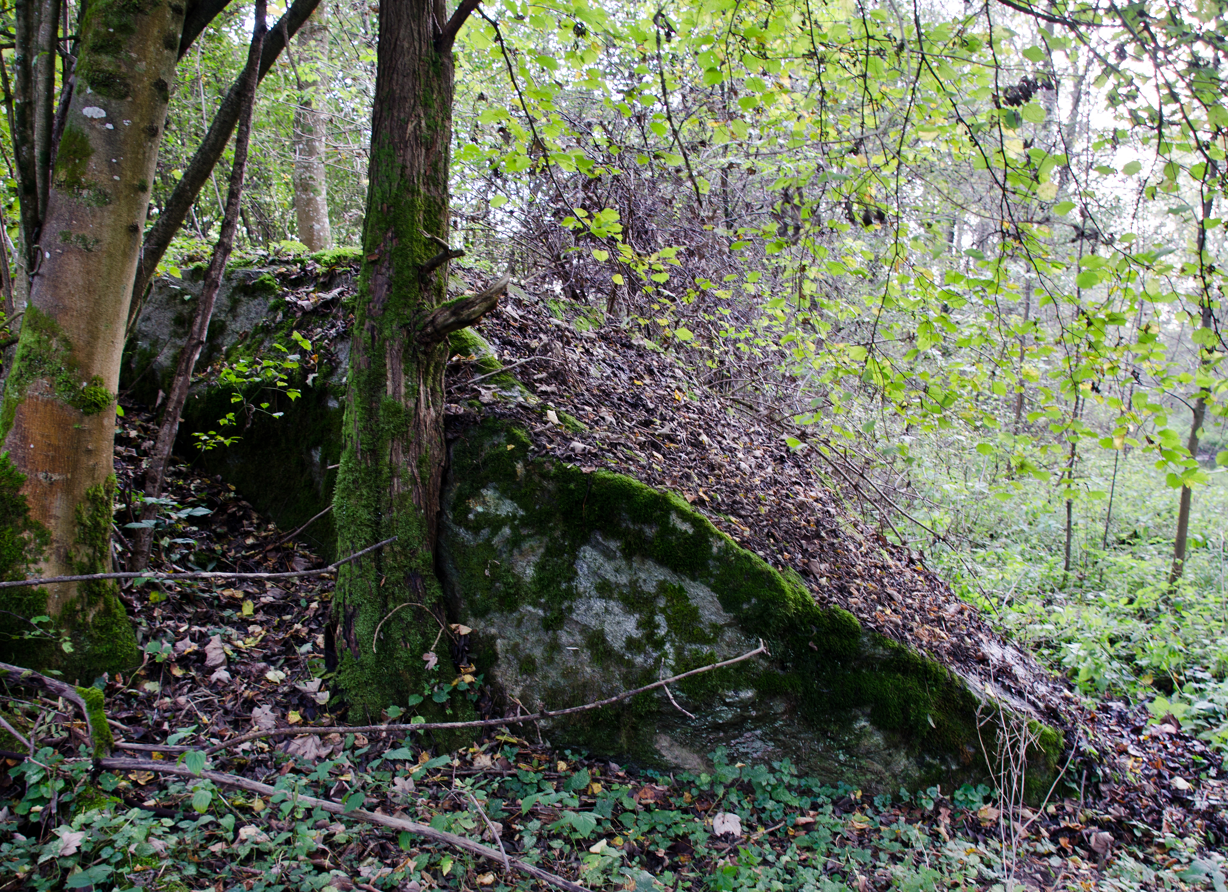 Der Pegelstein ist ein stark mit Moos bewachsener erratischer Block bzw. Findling aus Chloritgneis bei Dotzigen im Kanton Bern, Schweiz